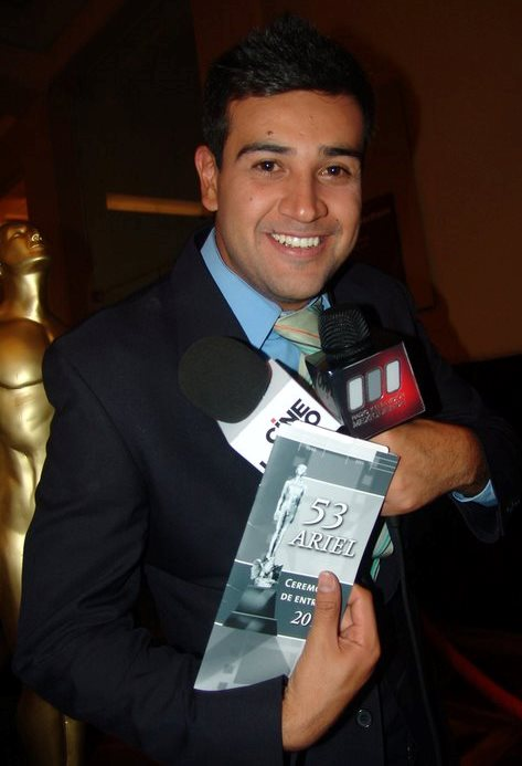 Rolando durante la quincuagésima tercera entrega del Premio Ariel.